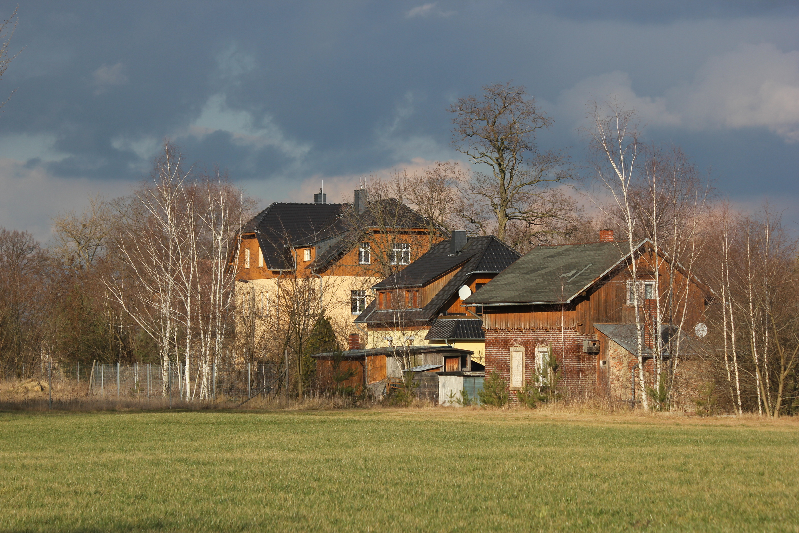 Hornjoserbsce: Něhdyše dwórnišćo pola Radworja.